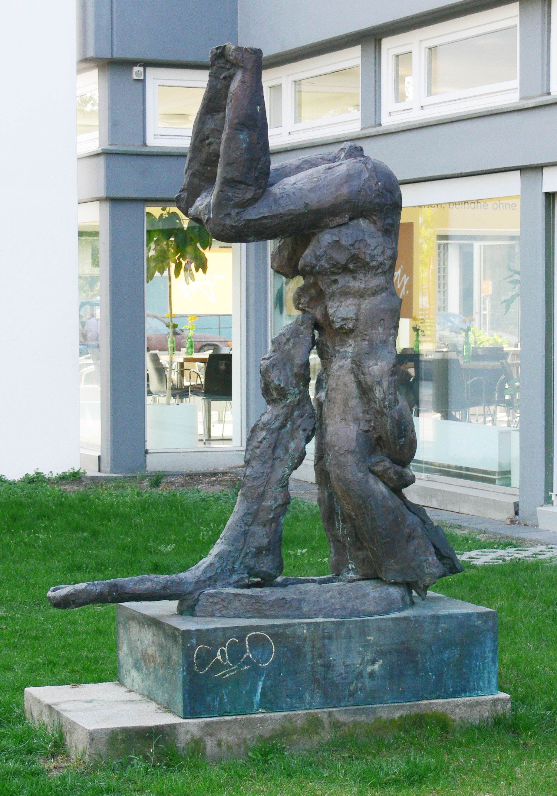 Berlinische Galerie Native nameBerlinische GalerieLocationBerlinCoordinates52° 30′ 14.04″ N, 13° 23′ 53.16″ E Established1975, 2004 (moved to present quarters)Web page control : Q700222 VIAF: 129006962 ISNI: 0000 0001 2155 5871 LCCN: n80128209 GND: 2053618-5 SUDOC: 029122295 WorldCat institution QS:P195,Q700222 Berlin-Kreuzberg, Alte Jakobstraße, Außenbereich Berlinische Galerie Rolf Szymanski: Flucht aus der Zeit, 1992–2004, Bronze